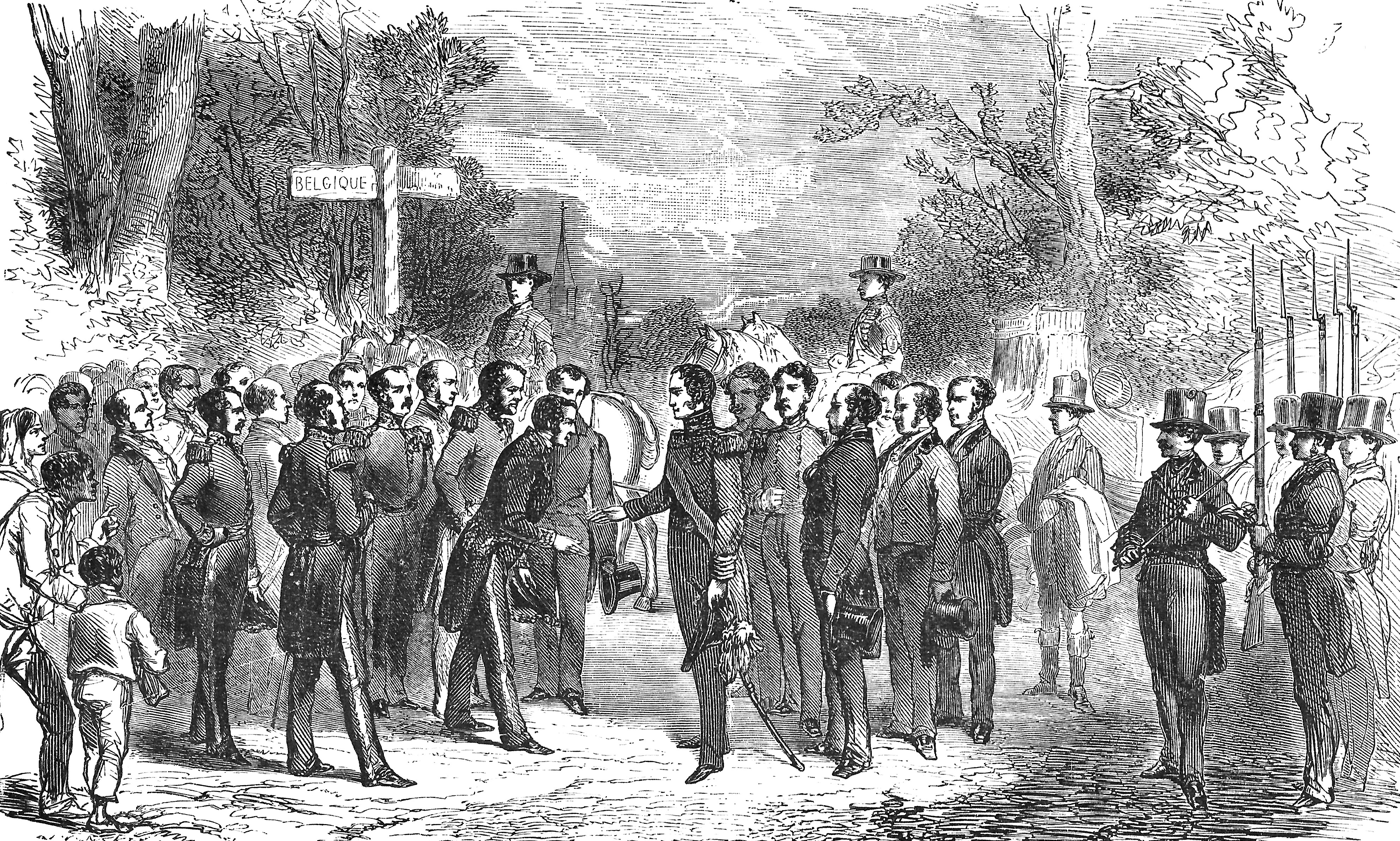 Arrivée de Léopold Ier à la frontière belge, La Panne, le 17 juillet 1831. — Le 16 juillet 1831, le prince Léopold embarque à Douvres sur le yacht Crusader, à destination du continent. Il est accueilli à Calais par le Premier ministre de France à Bruxelles. Le 17 juillet 1831, il arrive en calèche à La Panne, par la plage de Dunkerque. Il est solennellement accueilli, avant de continuer le voyage vers Laeken, en passant par Furnes, Ostende, Bruges, Gand et Alost. Le monument sur l’esplanade Léopold Ier à La Panne symbolise la porte par laquelle le premier roi des Belges est entré en Belgique.